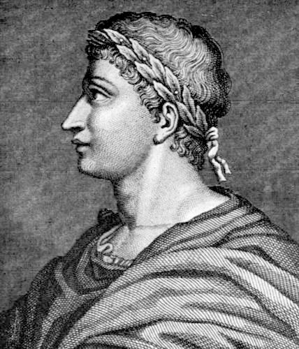 Poeta latino Ovídio.